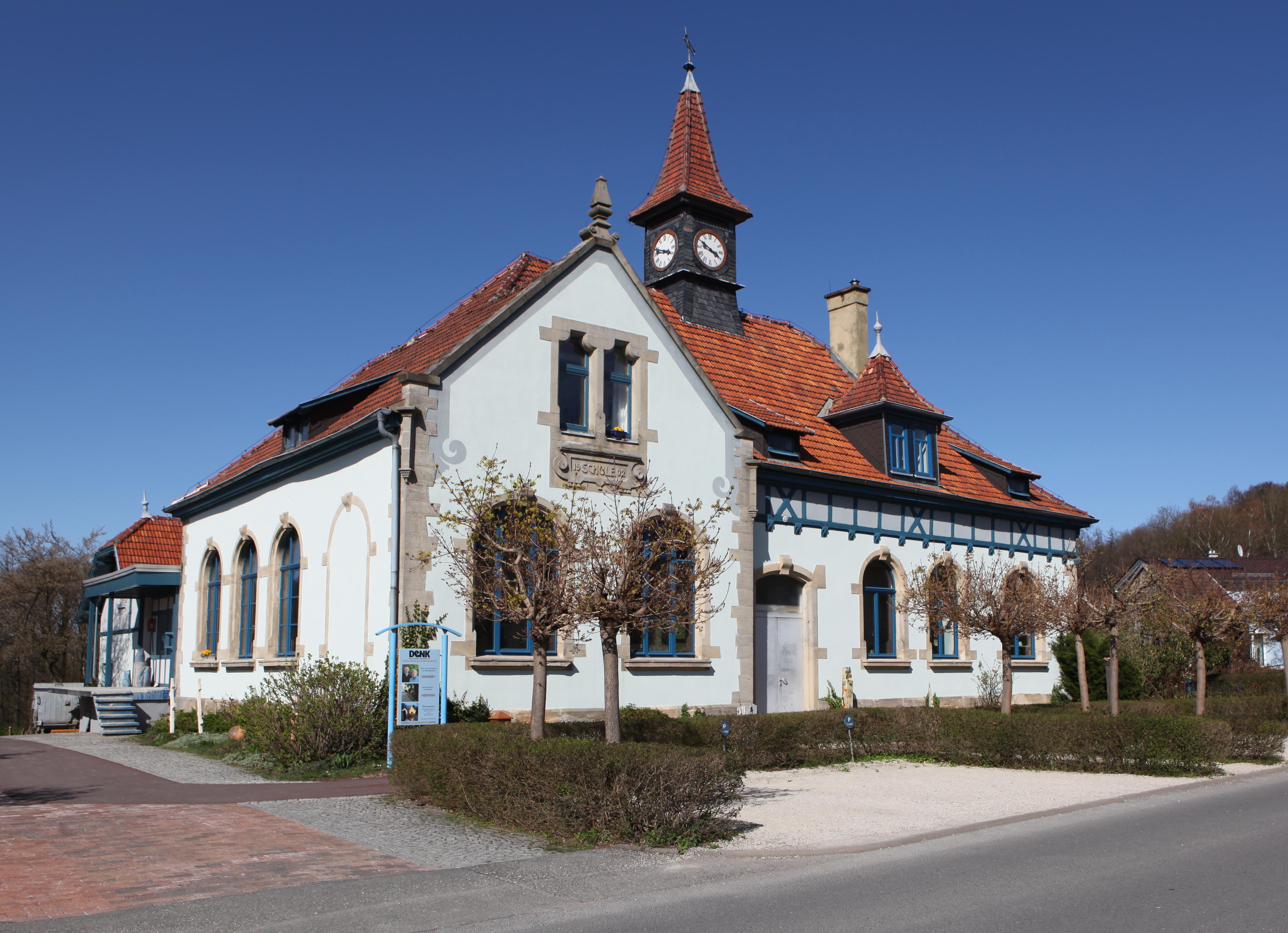 Schule Neershof, Coburg